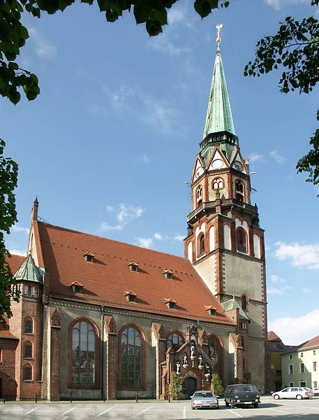 Description: Löbau, Nicolaikirche Date: Mai 2005 Author: Peter Emrich, Löbau